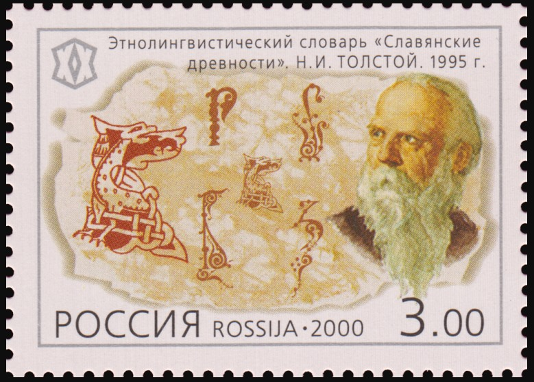 Этнолингвистический словарь «Славянские древности». Н. И. Толстой. 1995 г.